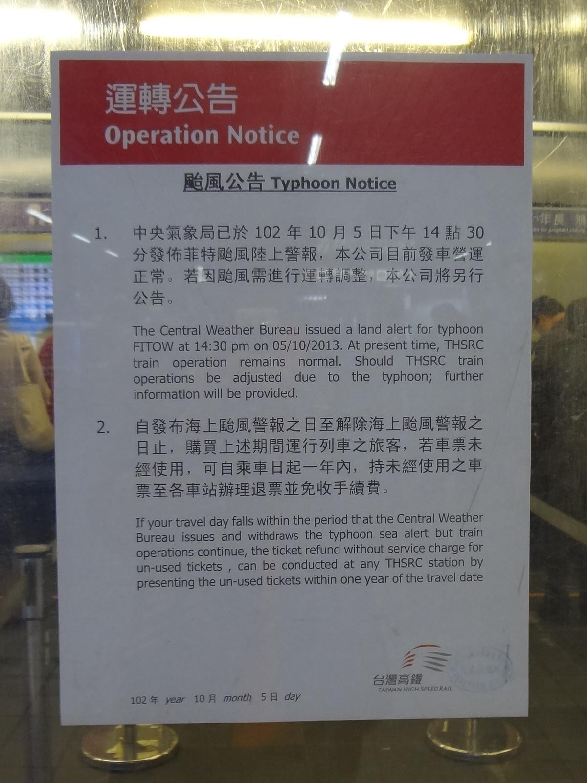 台灣高鐵2013年10月5日颱風公告